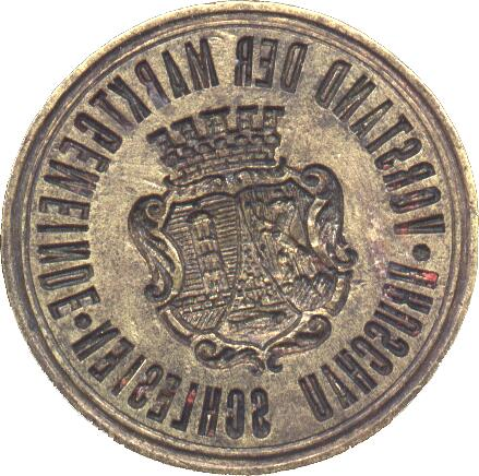 Pečetidlo městyse Hrušov z roku 1909 nebo 1910.